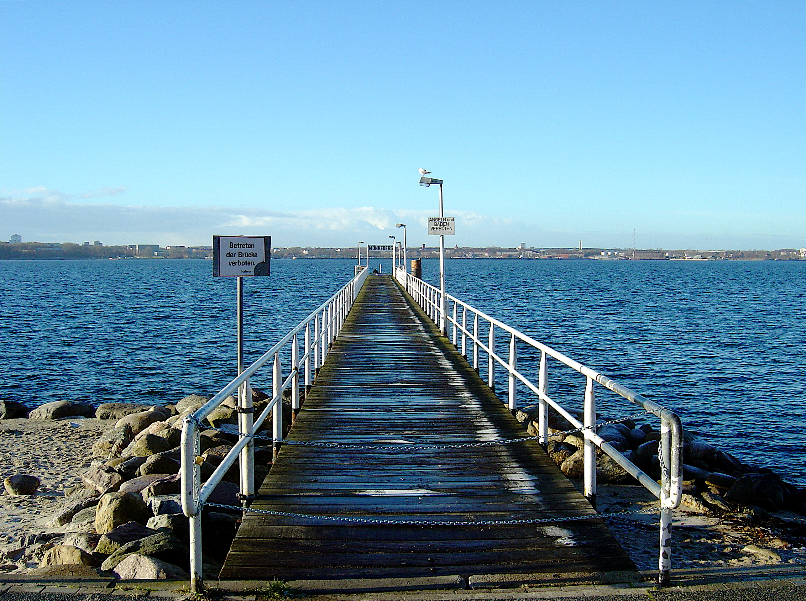 Betreten verboten